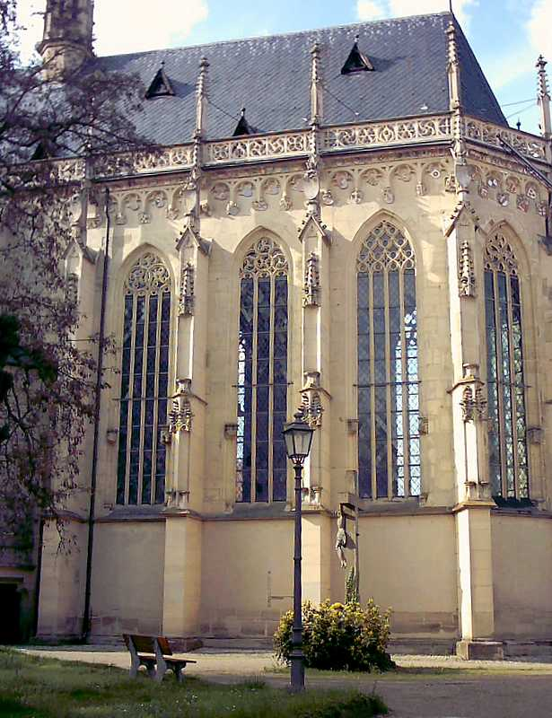 Der Chor der Ritterkapelle Haßfurt von Süden. Eigene Aufnahme, 2005